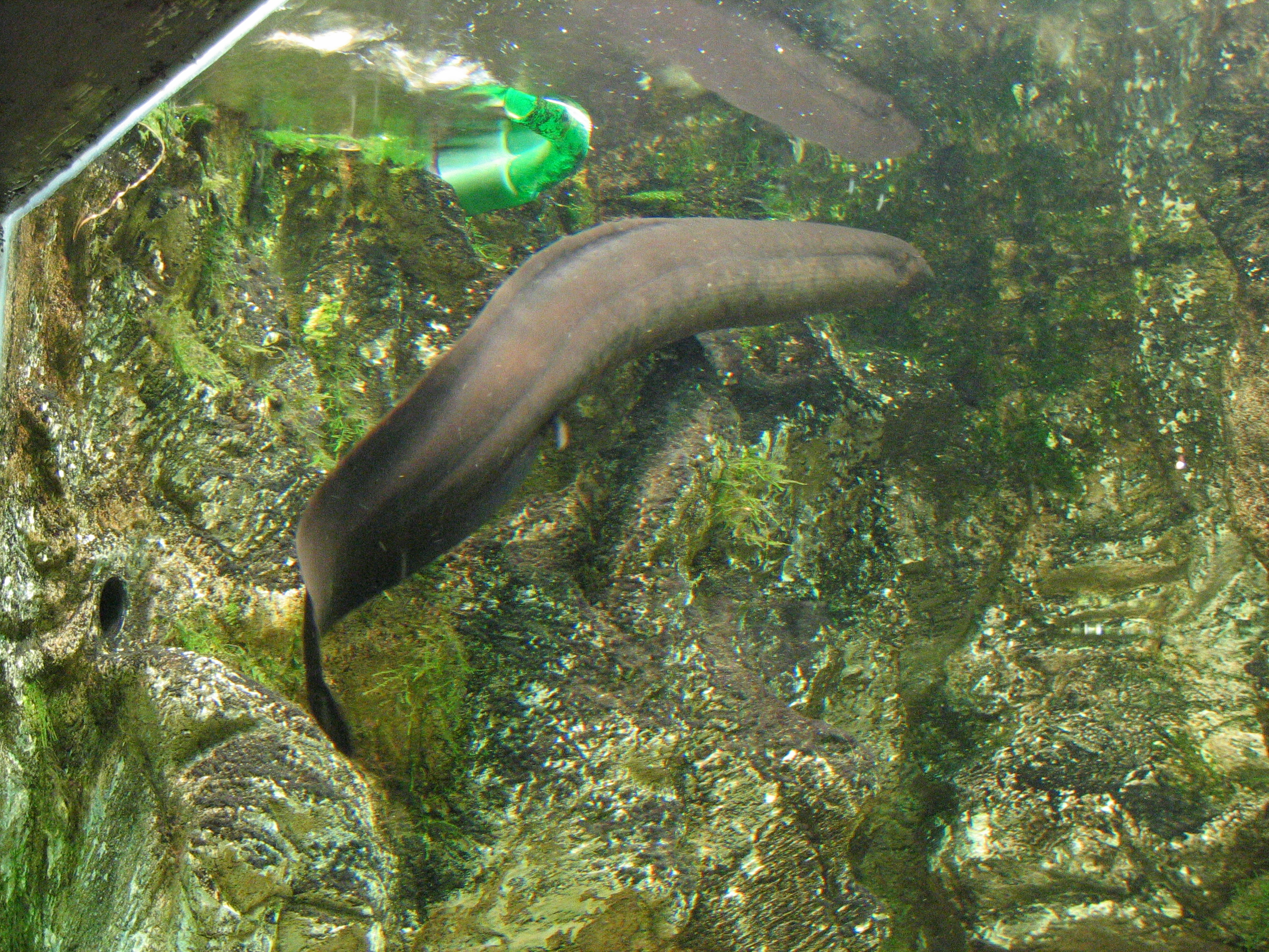 Lepidosiren paradoxa aquarium porte dorée Paris